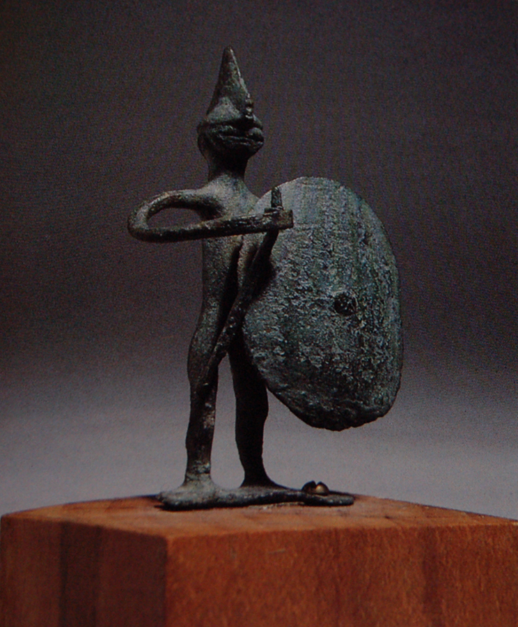 Fotografia di una statuetta veneta rappresentante un guerriero tratta da Il Veneto nell'antichità: preistoria e protostoria di A. Aspes, libro stampato a Verona nel 1984.